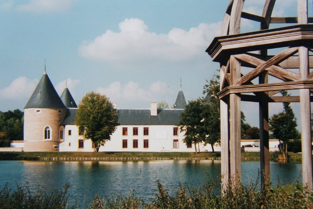 Château de Chamerolles (France)